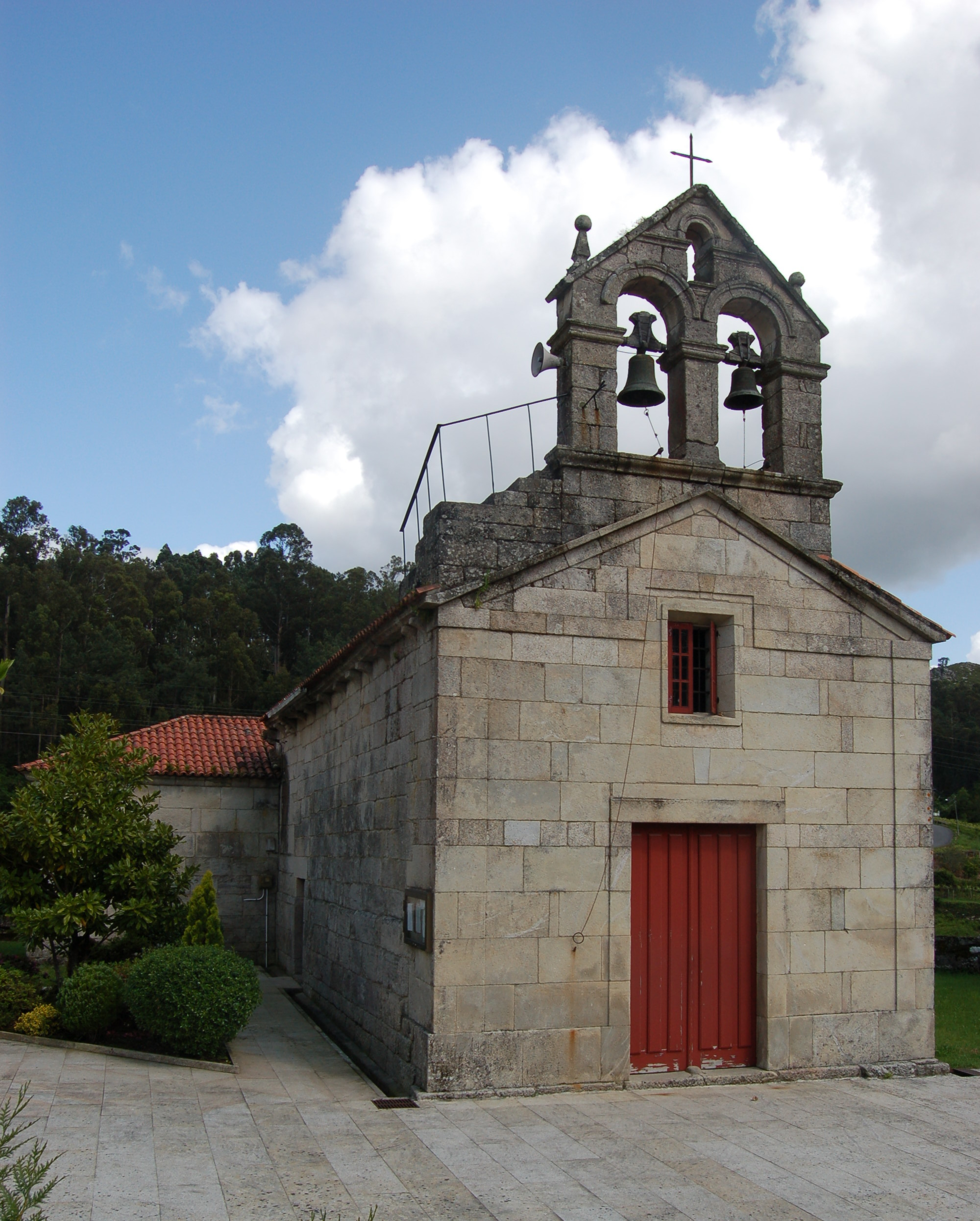 Igrexa de Santo André de Figueirido